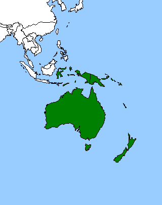 écozone australasienne